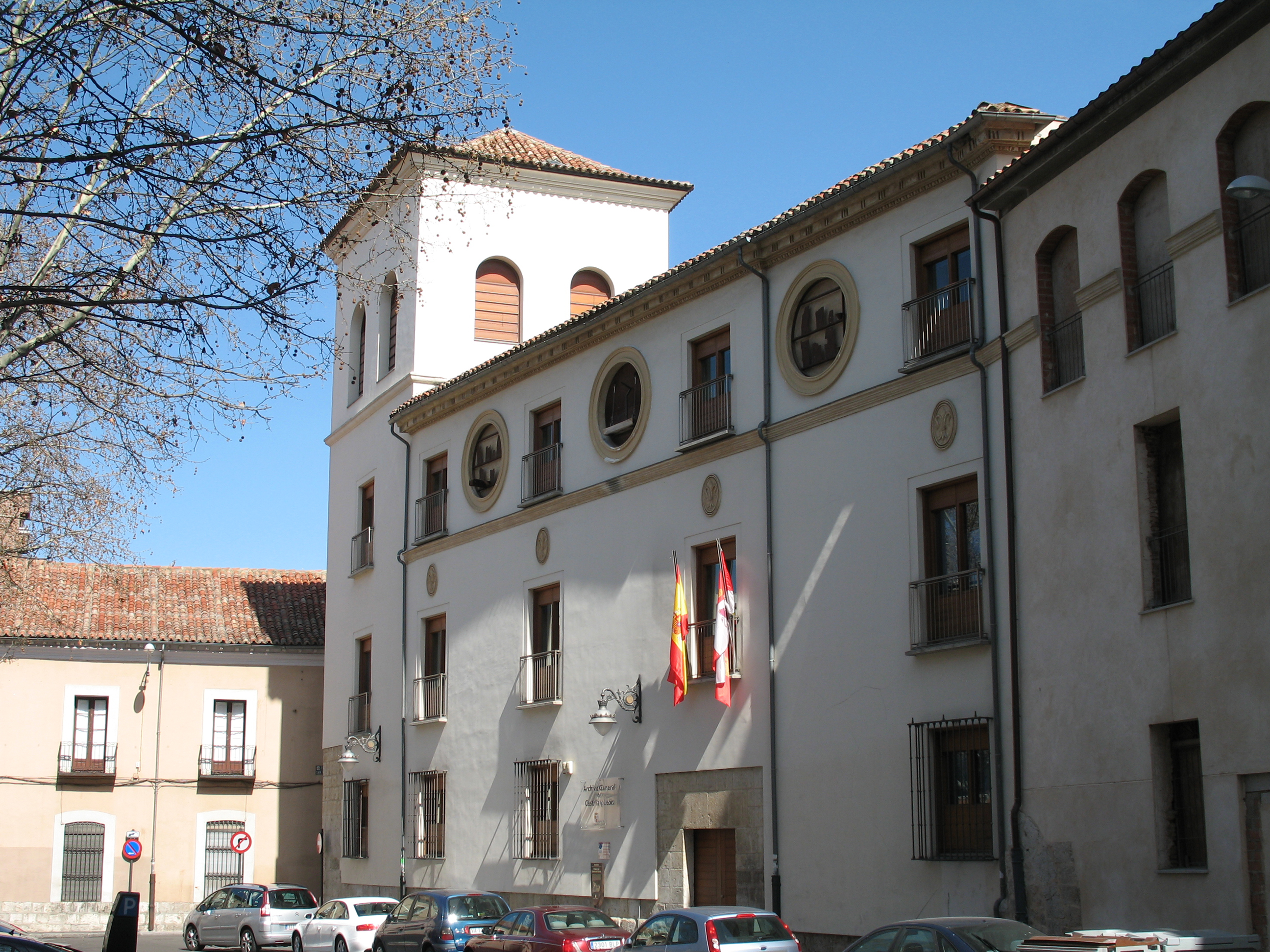 Fachada del palacio a la plaza de las Brigidas